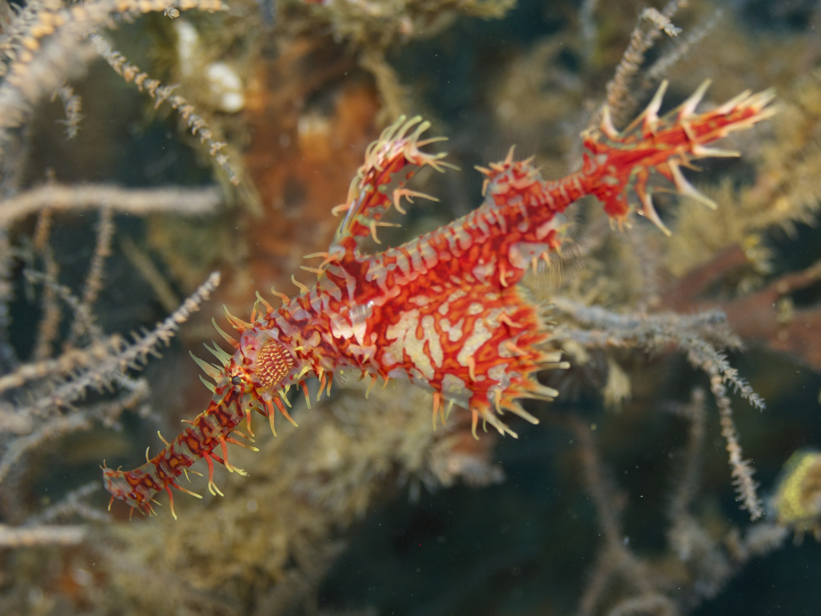 Solenostomus paradoxus